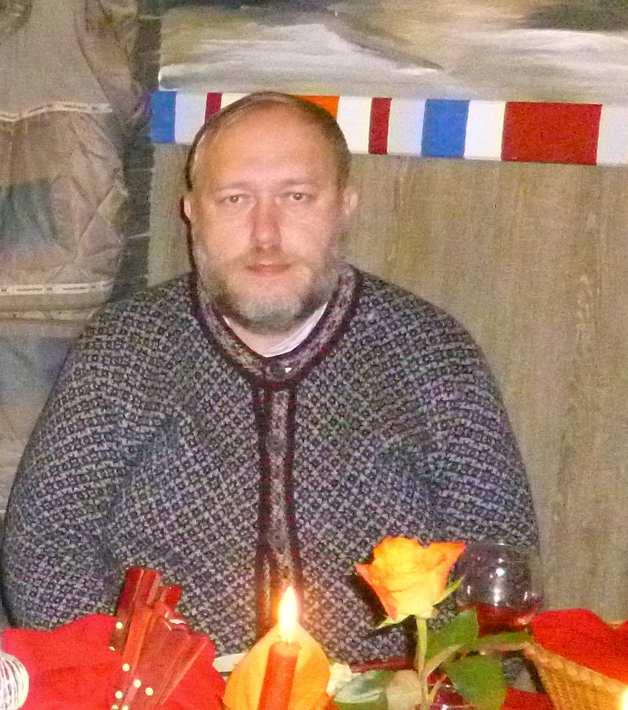 Vootele Hansen detsembris 2014